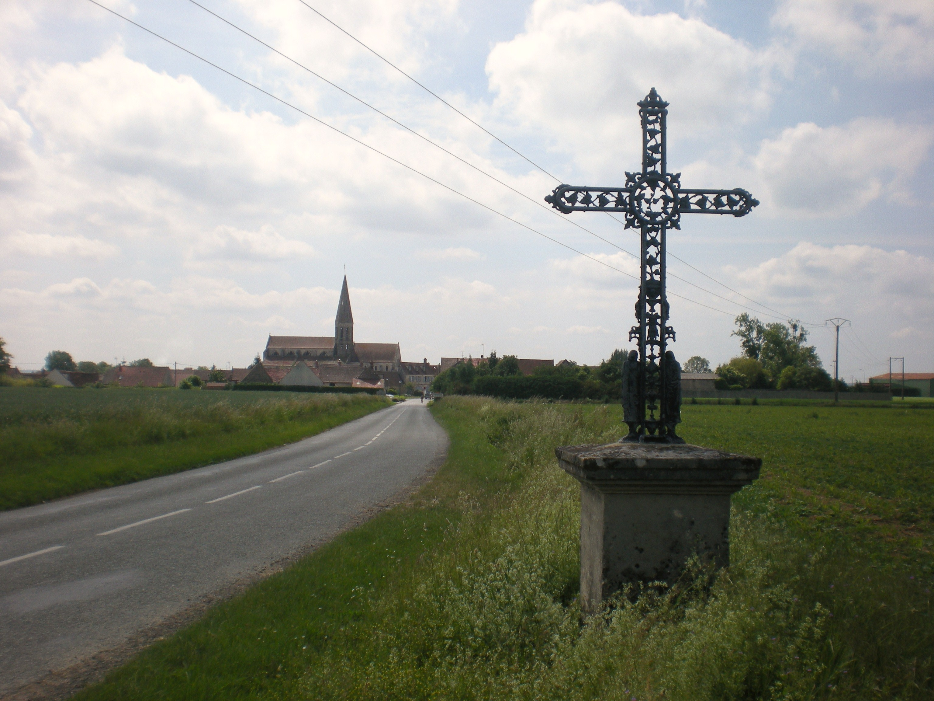 Le village de Cambronne-lès-Clermont depuis la D110